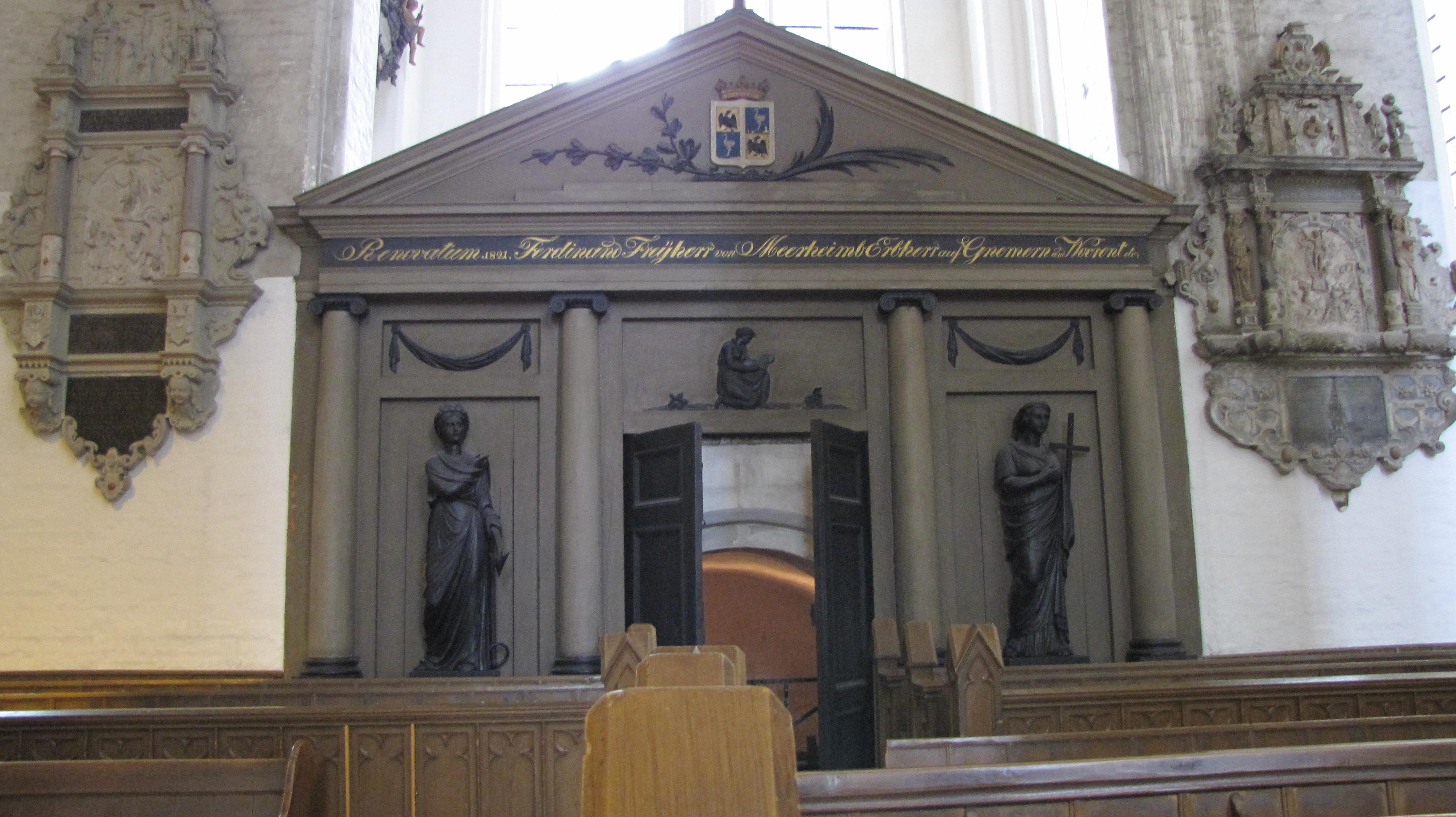 Von Meerheimbsches Erbbegräbnis, Marienkirche Rostock